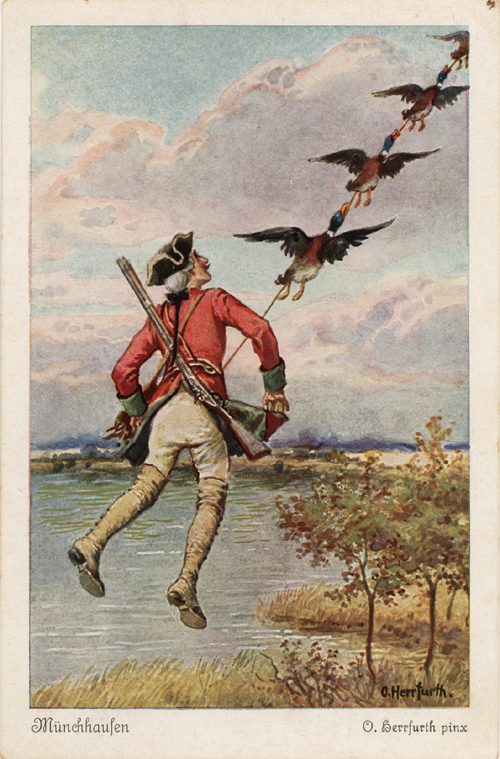 Postkarte des Verlages Farbenphotographische Gesellschaft m.b.H., Stuttgart. UVACHROM. Serie 324. Im Goethezeitportal publiziert von Georg Jäger